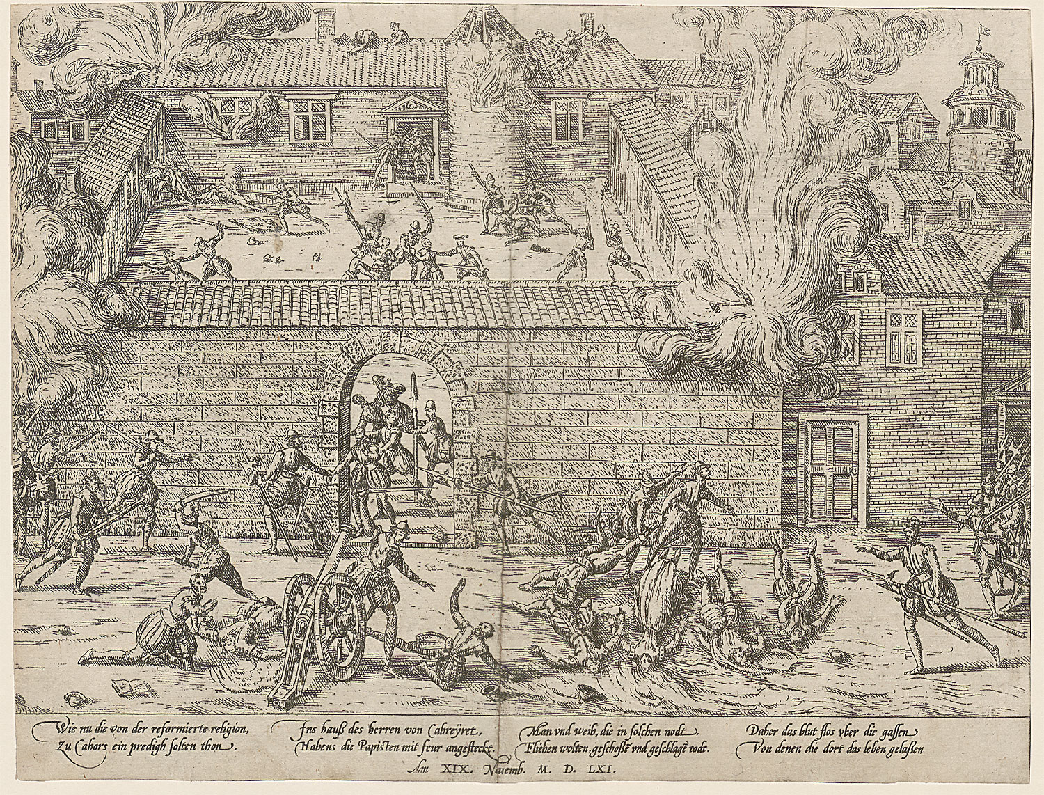 Hogenberg, Franz: Der Hugenottenmord in Cahors (1561); Radierung, um 1600